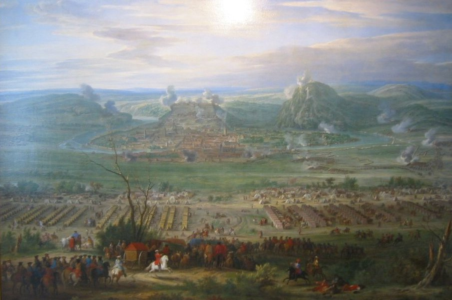 1674 - Louis XIV reprend la Franche-Comté et Besançon par la guerre à Charles II de Habsborug d'Espagne après 201 ans de règne Habsbourg . Il l'associe définitivement à la France par le traité de Nimègue.